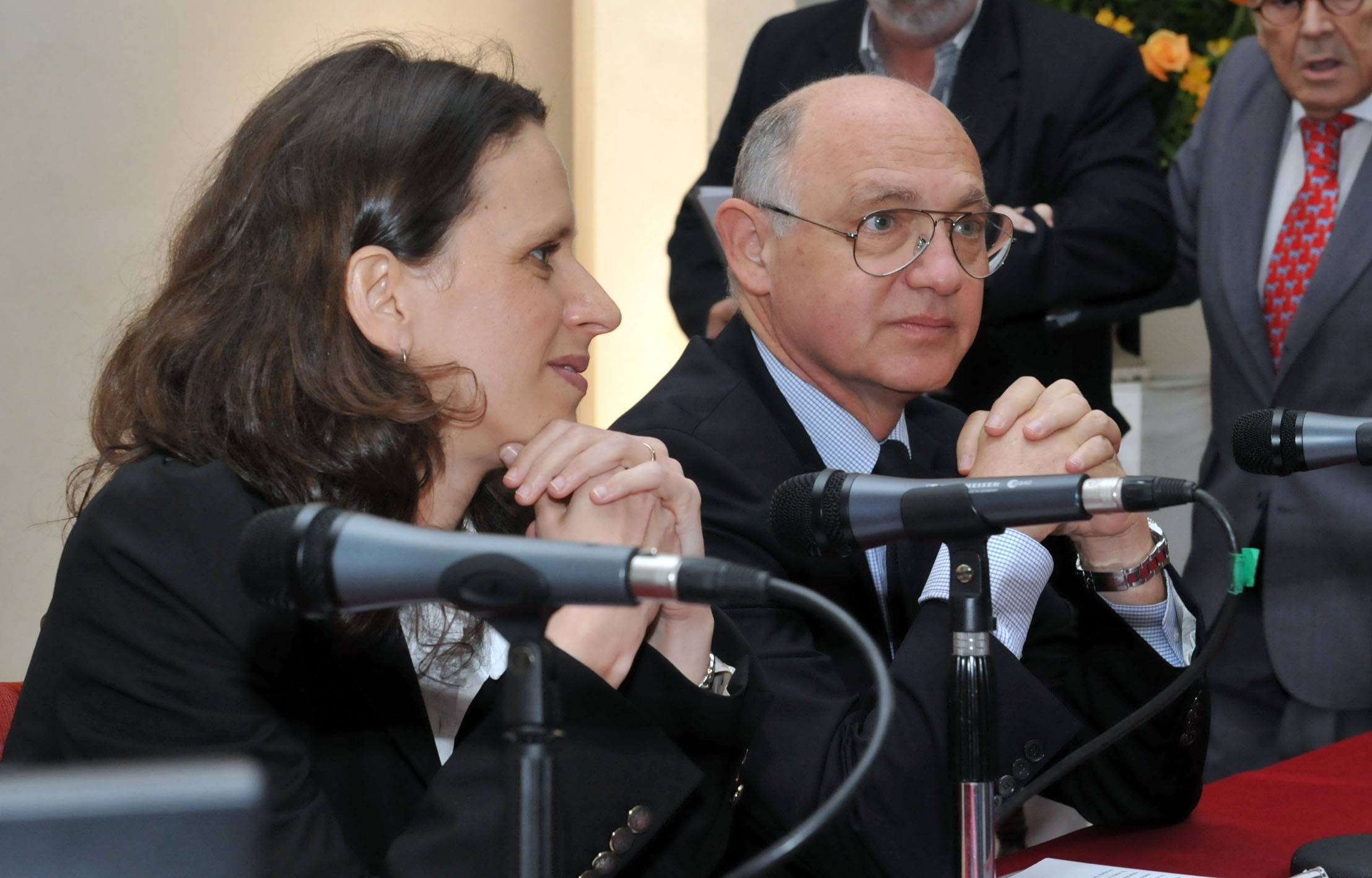 Buenos Aires, diciembre 19 de 2012 El Canciller Héctor Timerman presideió la presentación de la “Política de promoción comercial de la Argentina en el mundo. Acciones 2012 y agenda 2013” en el Palacio San Martín. Participaron la secretaria de Relaciones Económicas Internacionales, Cecilia Nahón; la secretaria de Comercio Exterior del Ministerio de Economía y Finanzas Públicas, Beatriz Paglieri; el subsecretario de Desarrollo de Inversiones y Promoción Comercial, Carlos Bianco; el presidente del Consejo de Administración de la Fundación Exportar, Héctor Méndez, y el director ejecutivo de dicha Fundación, Javier Dufourquet. Se entregaron al finalixzar los premios Export-AR 2012. foto Roberto Daniel Garagiola